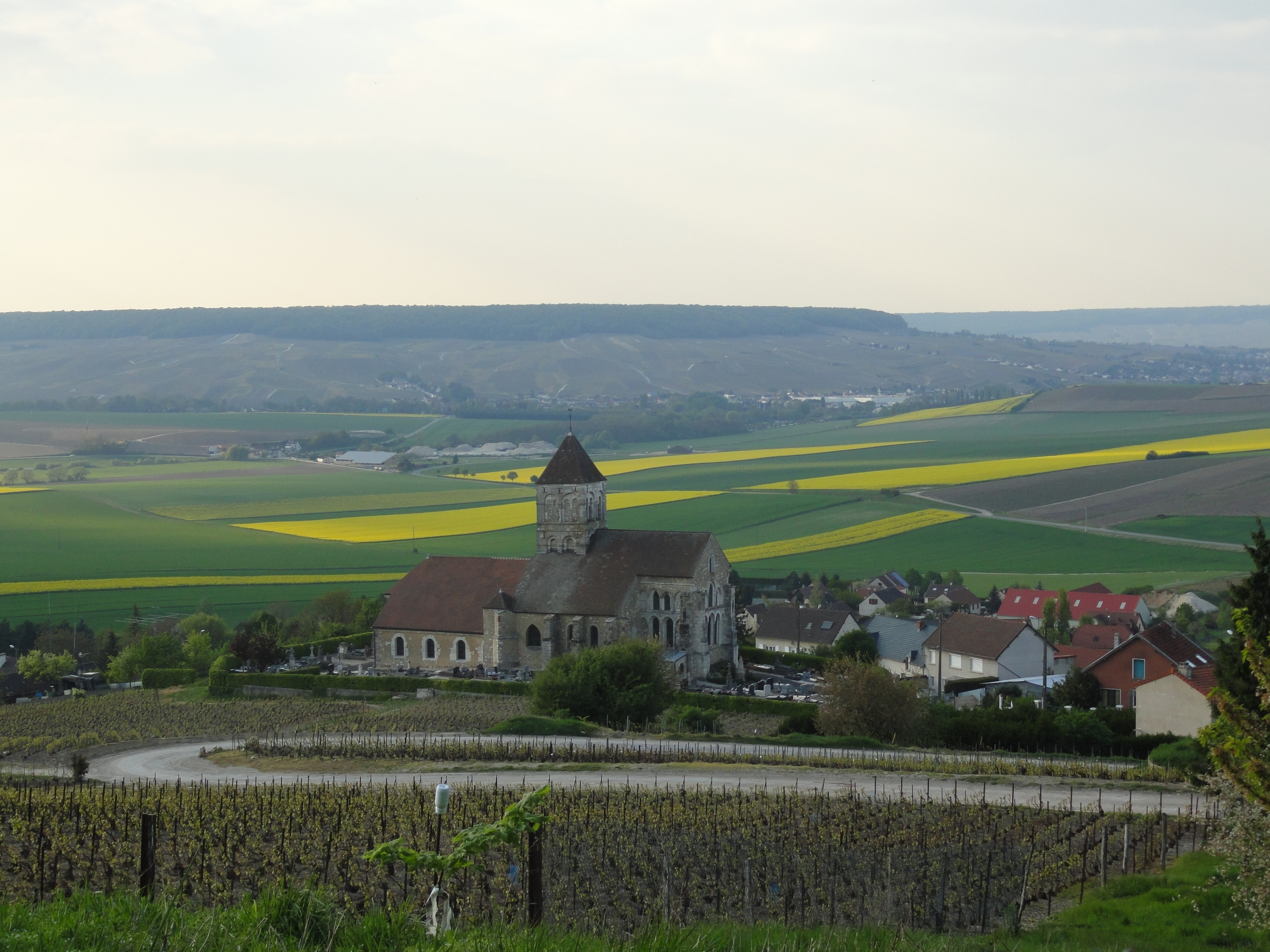 Vue du village de Cuis depuis la montagne d'Avize.